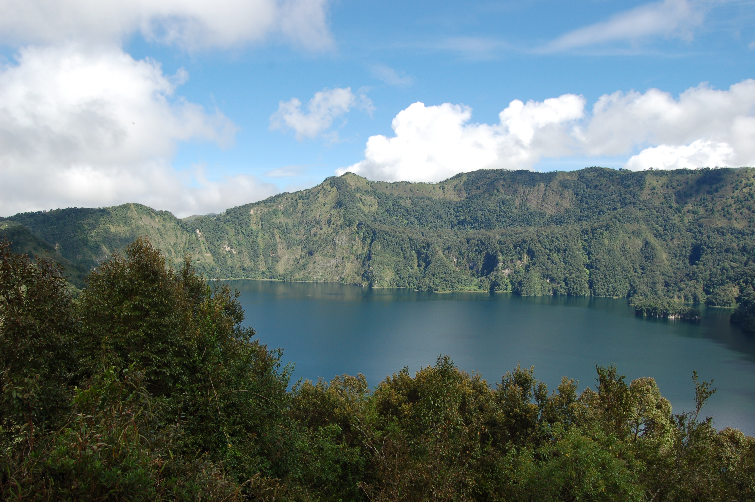 Lake Ngozi, Tanzania